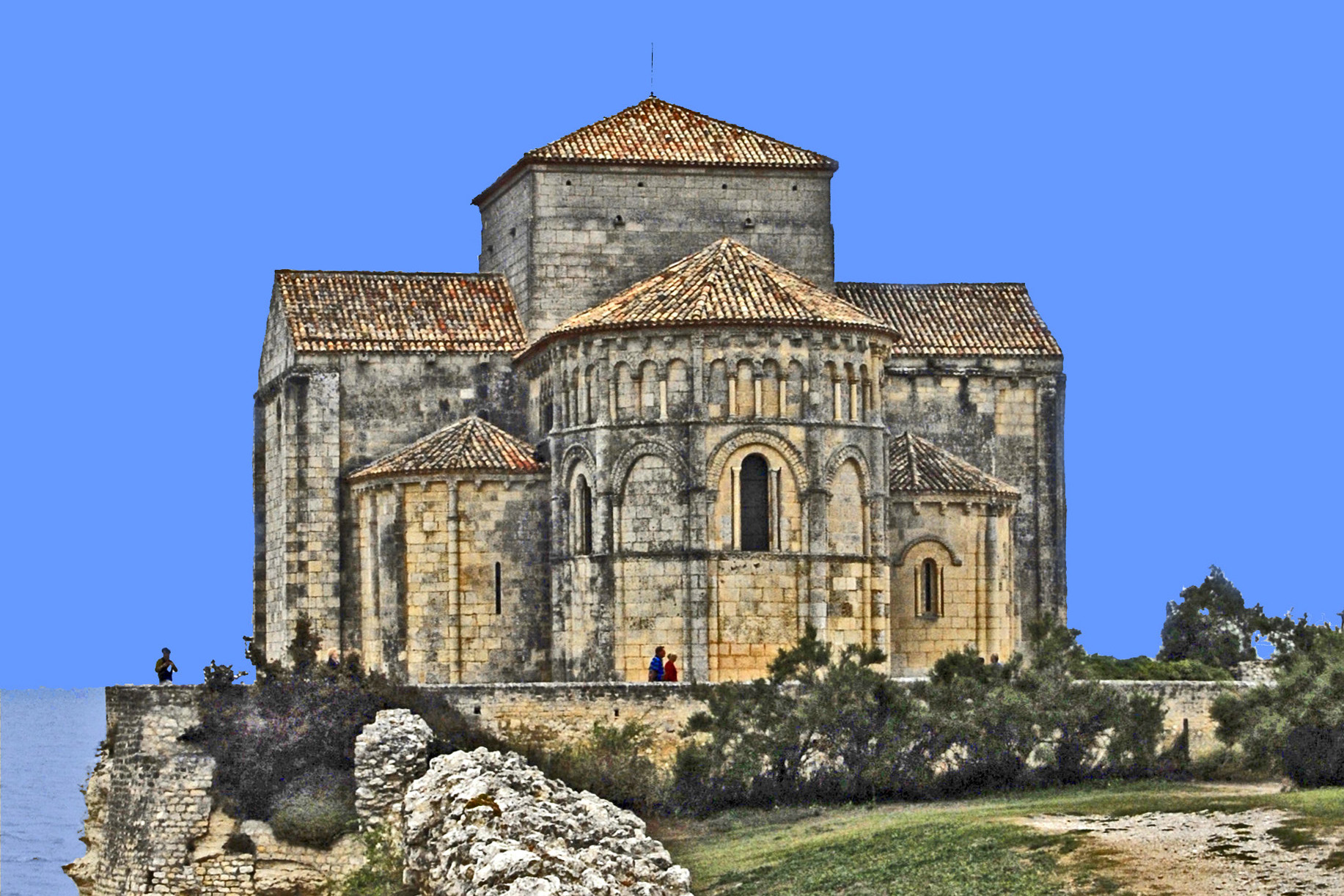 Sainte-Radegonde-Talmont-sur-Gironde, Chorhaupt von Osten